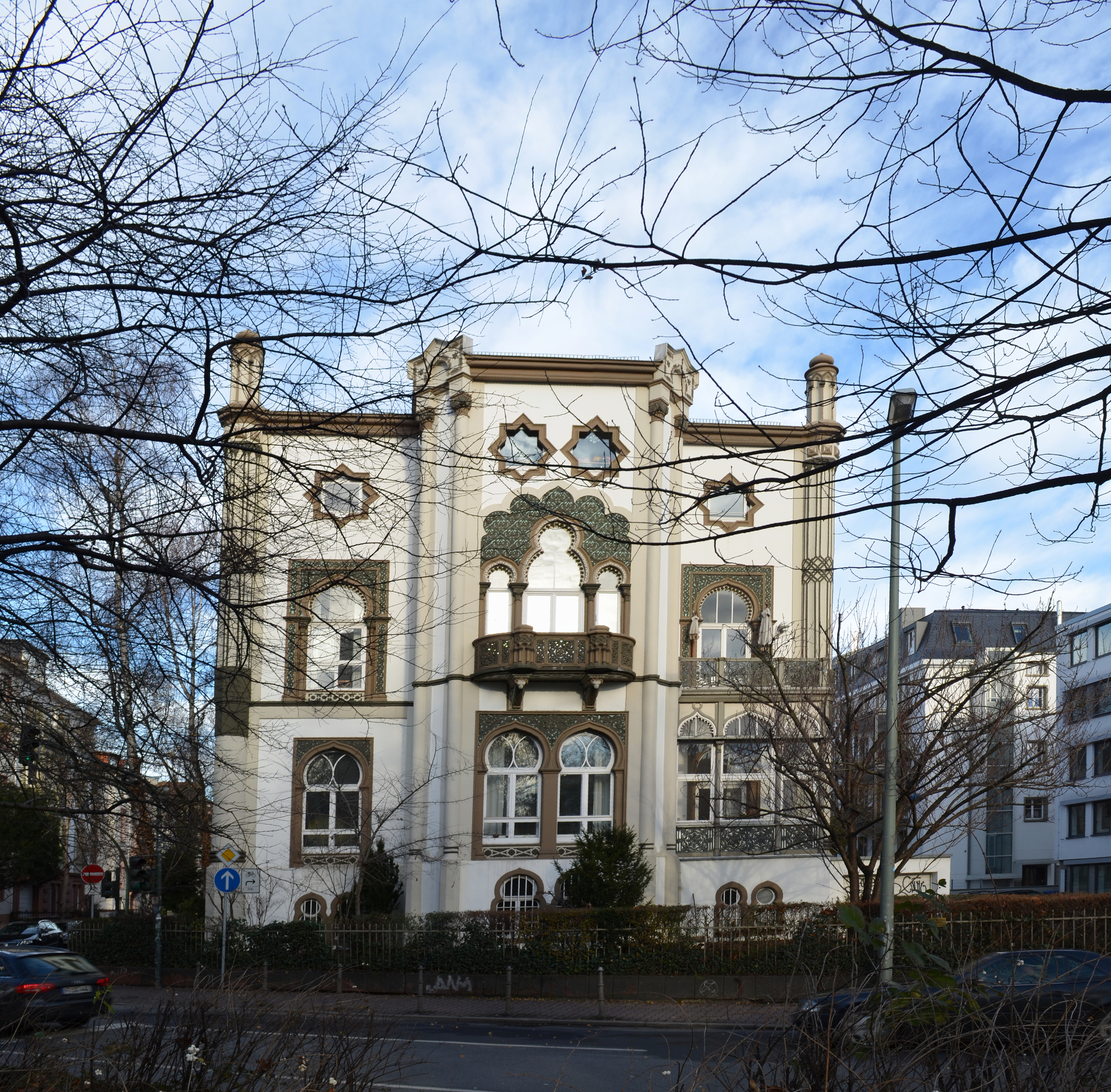 Frankfurt, Eschenheimer Anlage 29